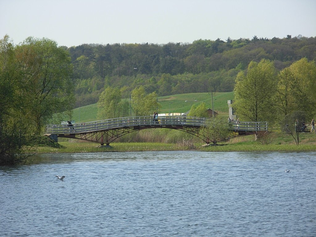 Mostek w Myślęcinku